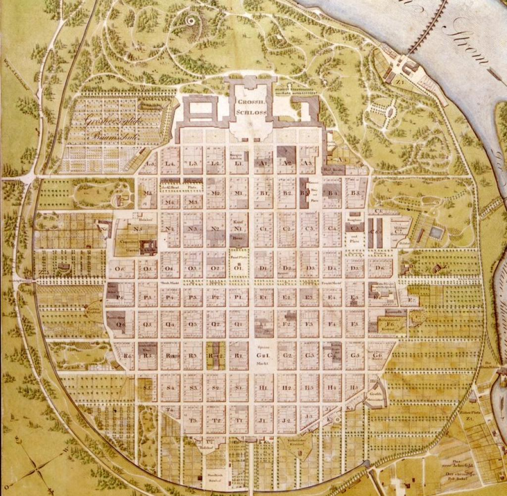 Stadtplan von Mannheim im Jahr 1813 nach Wilhelm von Traitteur - nach der Schleifung der Festungswälle, deren Verlauf noch deutlich zu erkennen ist, wurde der Schlossgarten im Englischen Stil neugestaltet